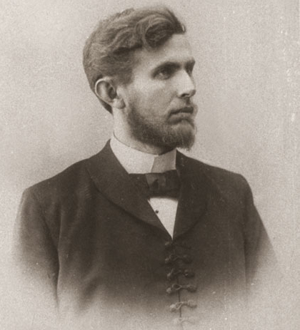 Václav Klement, Gründer von Laurin & Klement Licensing